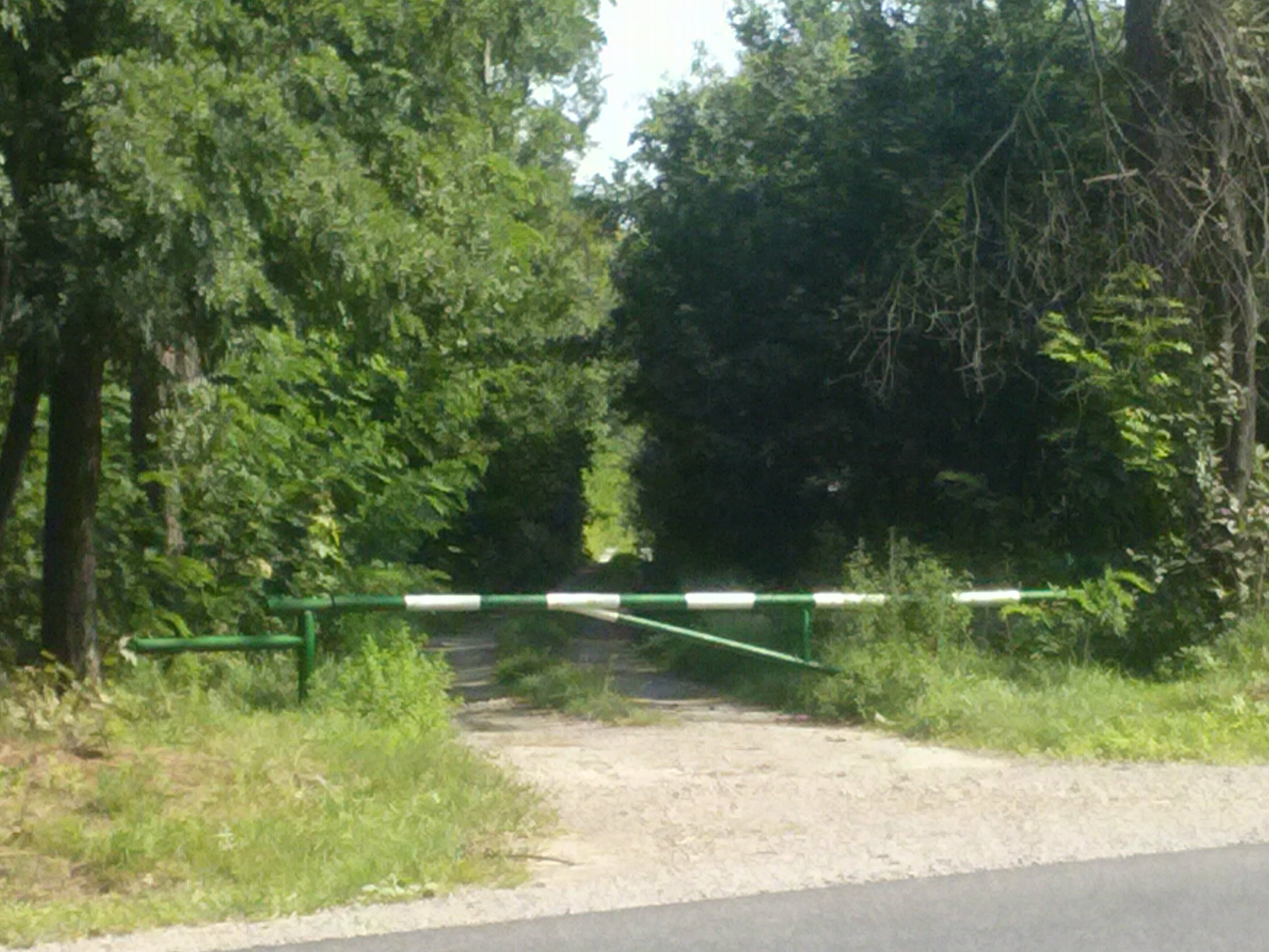 Szlaban leśny, zamykający wjazd do lasu